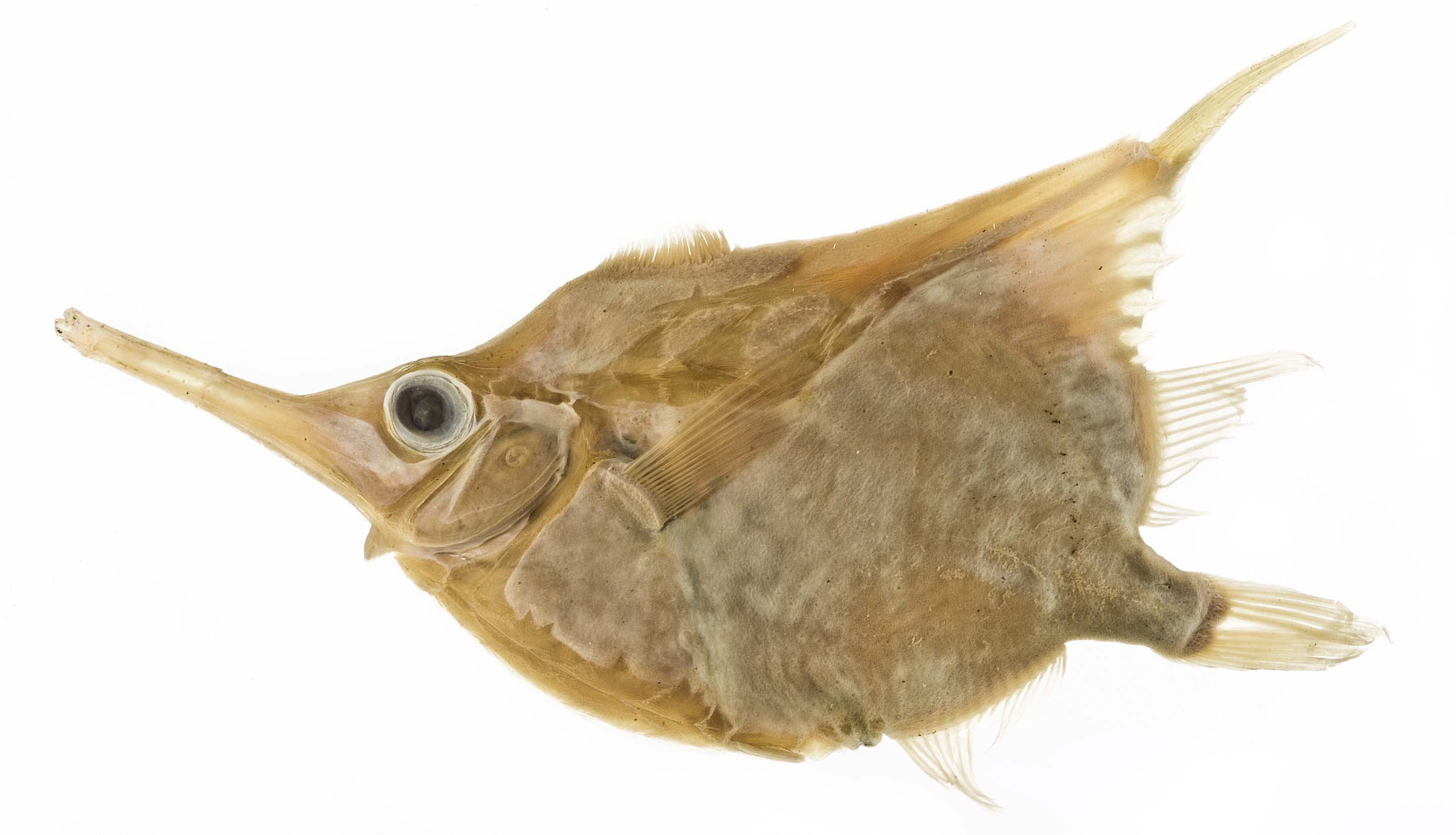 Notopogon fernandezianus